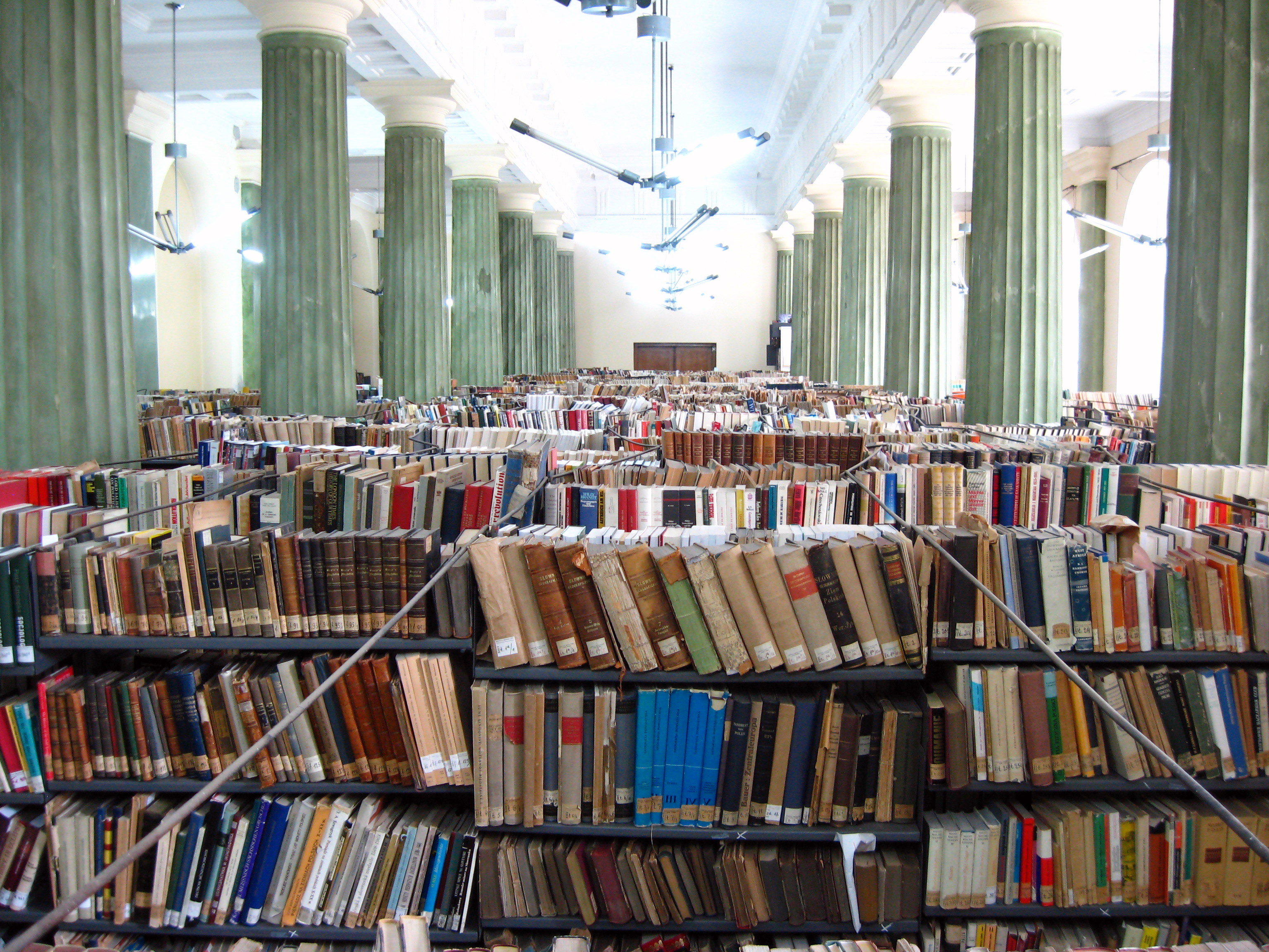 Stan z 2011 r.